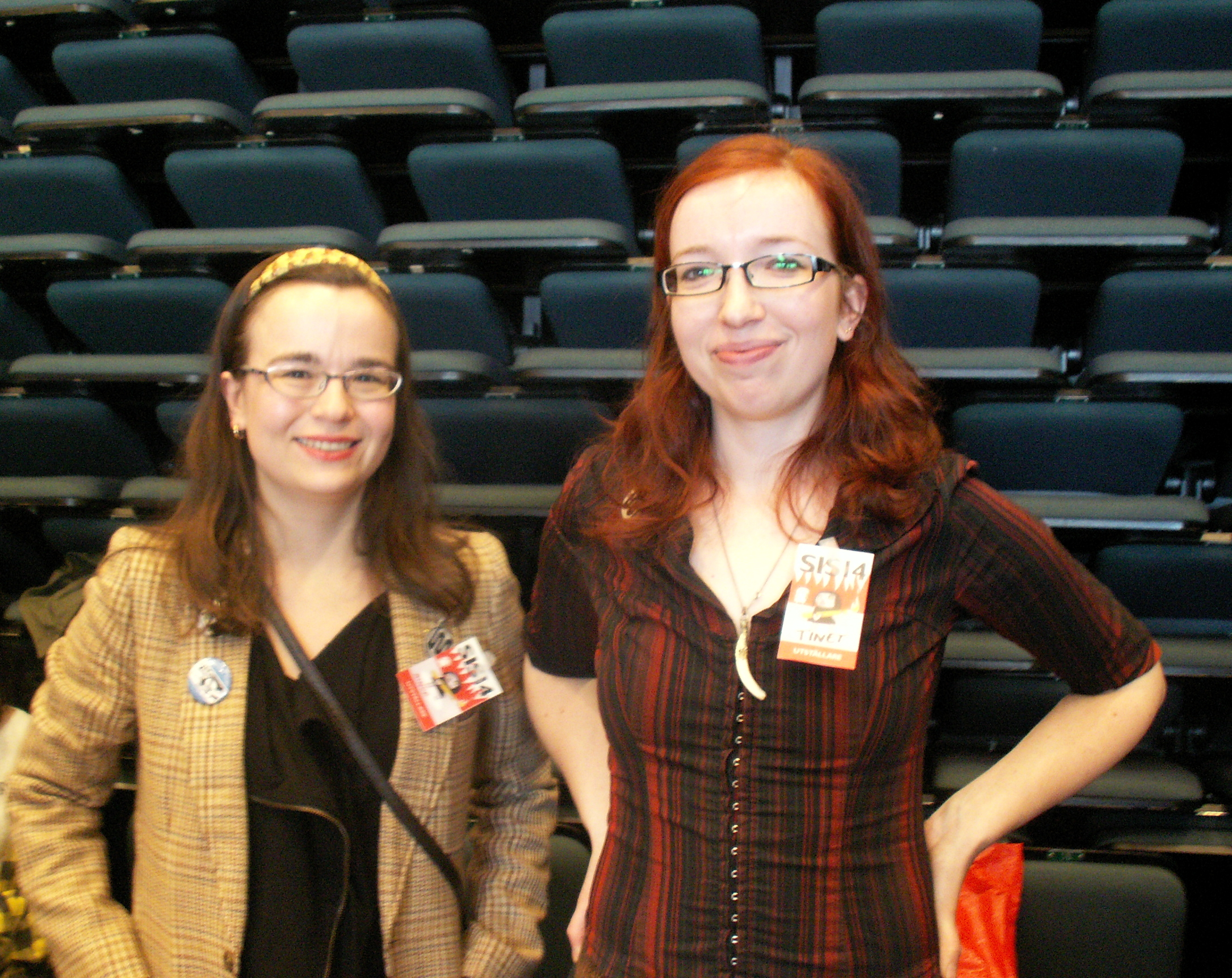 Systrarna Ainur och Tinet Elmgren vid deras bord på SIS 2014.